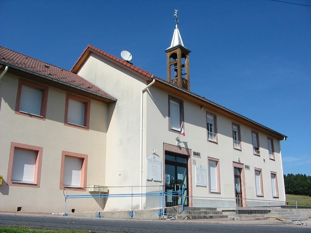 Pair-et-Grandrupt, commune des Vosges, canton de Saint-Dié-Est. La mairie-école.